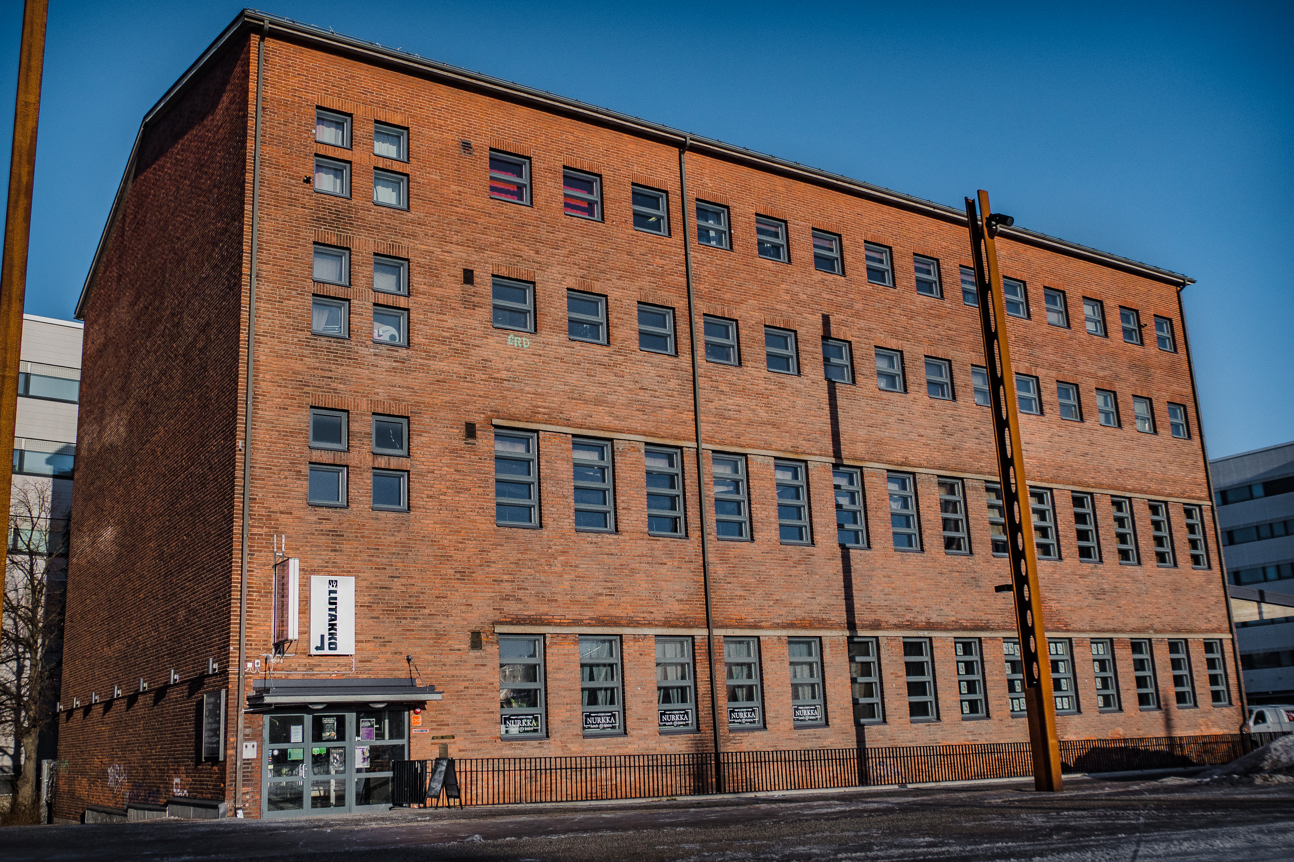 Schaumanin kadun leipomorakennus helmikuussa 2017.